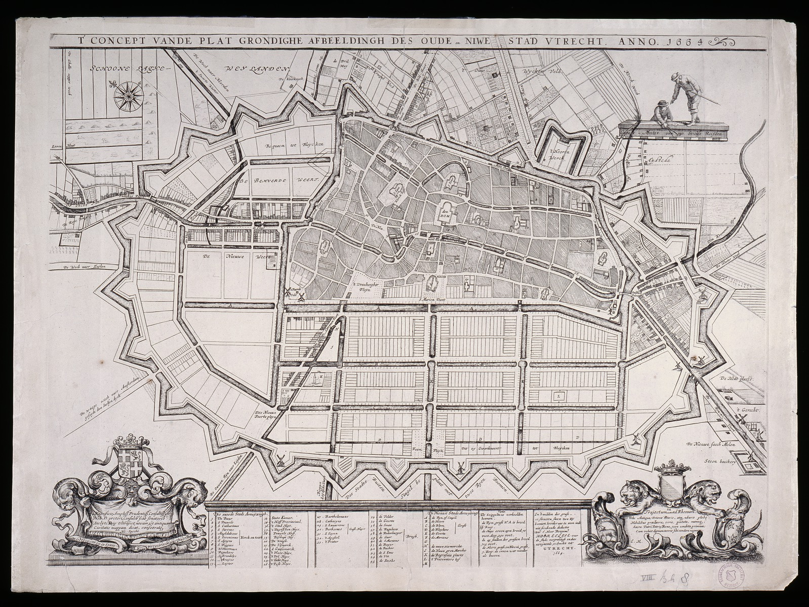 Kaart vervaardigd door Hugo Ruysch in 1664 met het plan van de Utrechtse burgemeester Hendrick Moreelse om de stad Utrecht grootschalig uit te breiden